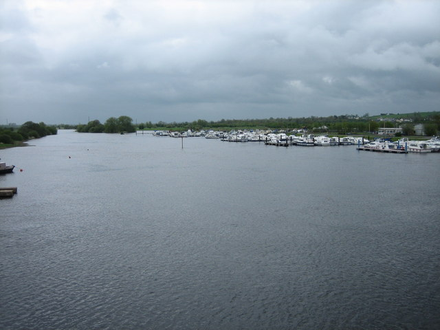 Marina